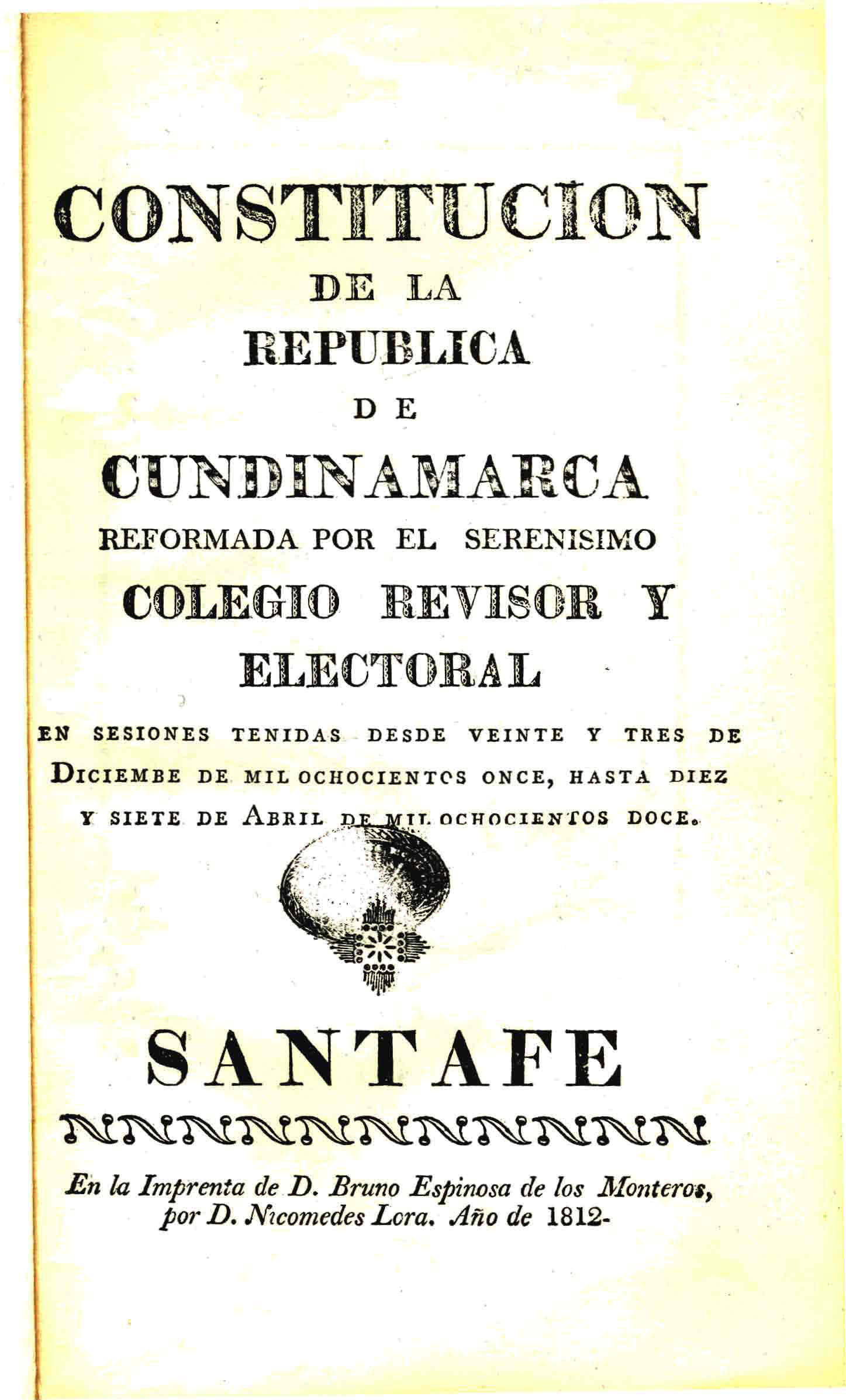 Reforma de la Constitución de Cundinamarca del año 1811